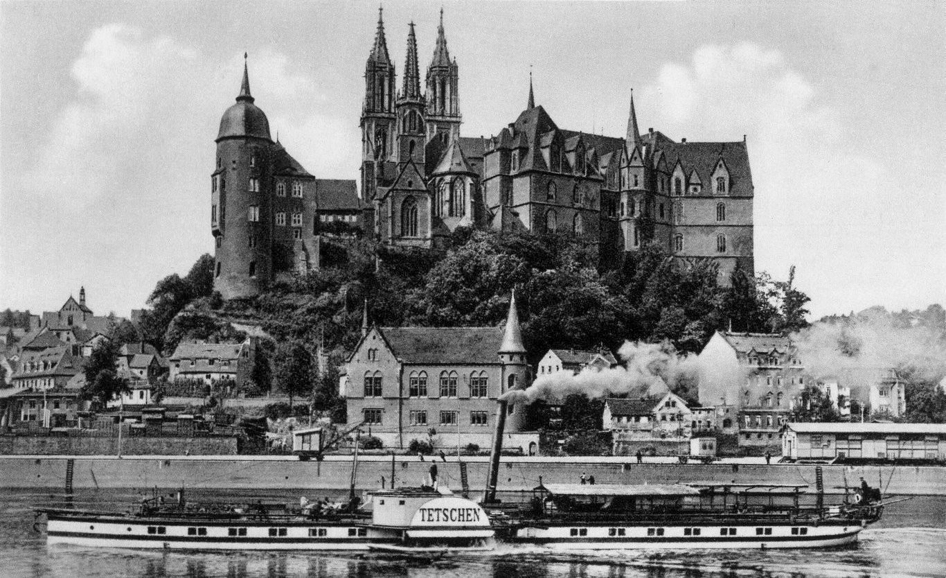 Meißen; Albrechtsburg und Dom - Elbe mit Dampfer Tetschen This postcard is from publisher Brück & Sohn in Meißen ( postcard has a unique number 23869 and is available in a higher resolution at the publisher. This images was uploaded in a cooperation project between Wikipedians and the publisher.